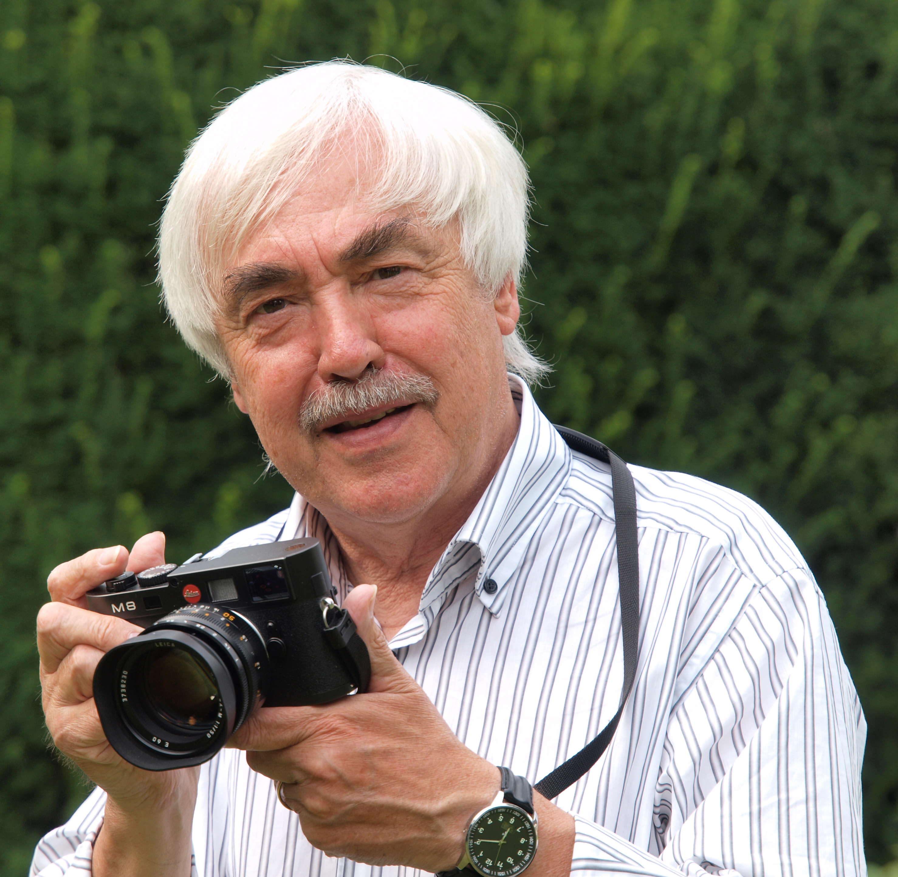 Helmut Stelljes (* 1933 in Bremen), deutscher Autor und Fotograf sowie Heimatkundler. (Porträtbild vom Juli 2009, Fotograf: NN/Privat.)